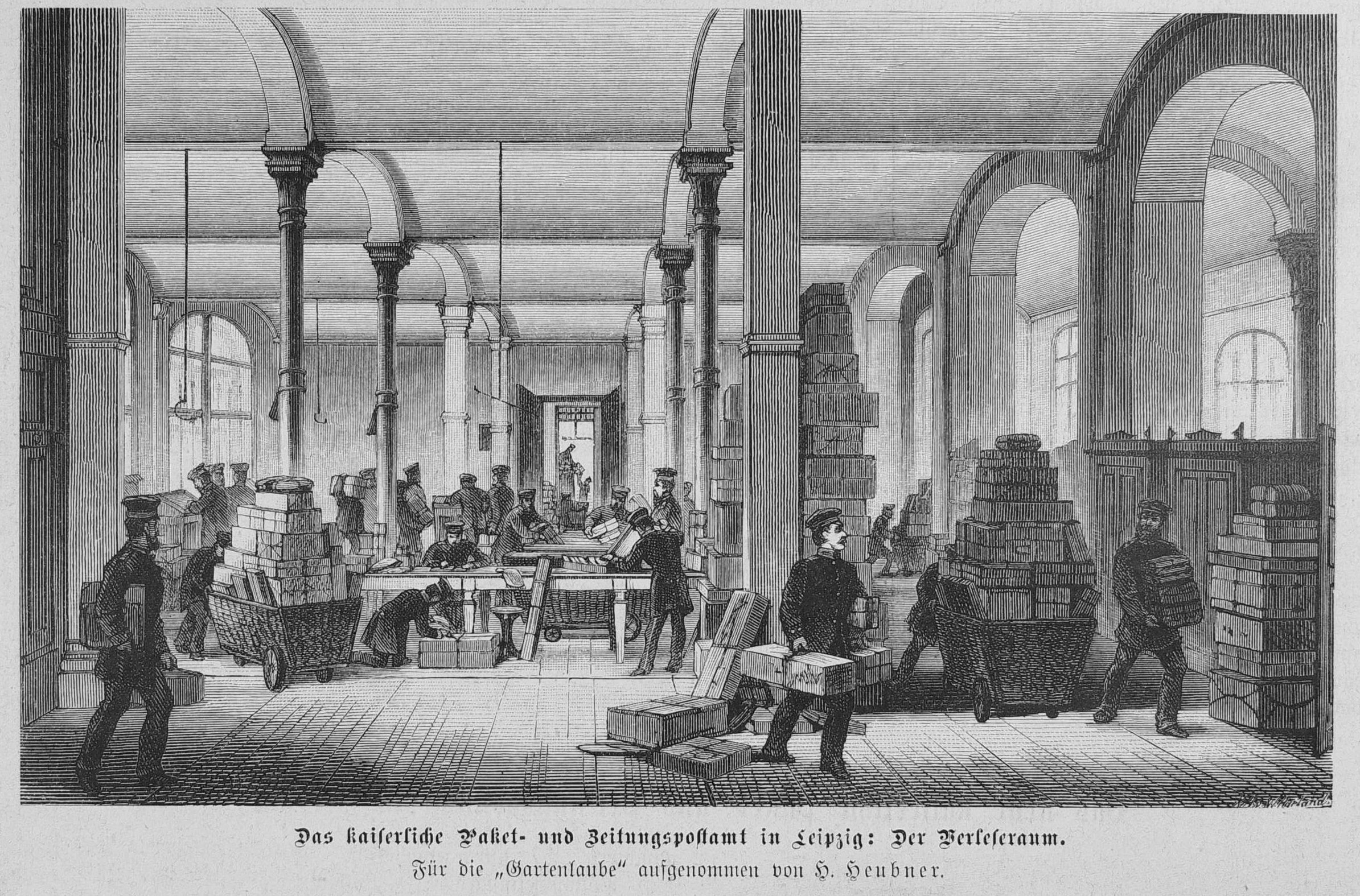 Das kaiserliche Paket- und Zeitungspostamt in Leipzig am Johannisplatz / Prager Straße 4-10, Höhe Grassimuseum, eröffnet am 16. Oktober 1880. Innenansicht Paketsortiersaal ("Verlesesaal") im Erdgeschoss des Hauptgebäudes. Stich von Hermann Heubner in "Die Gartenlaube" 1881, S. 412